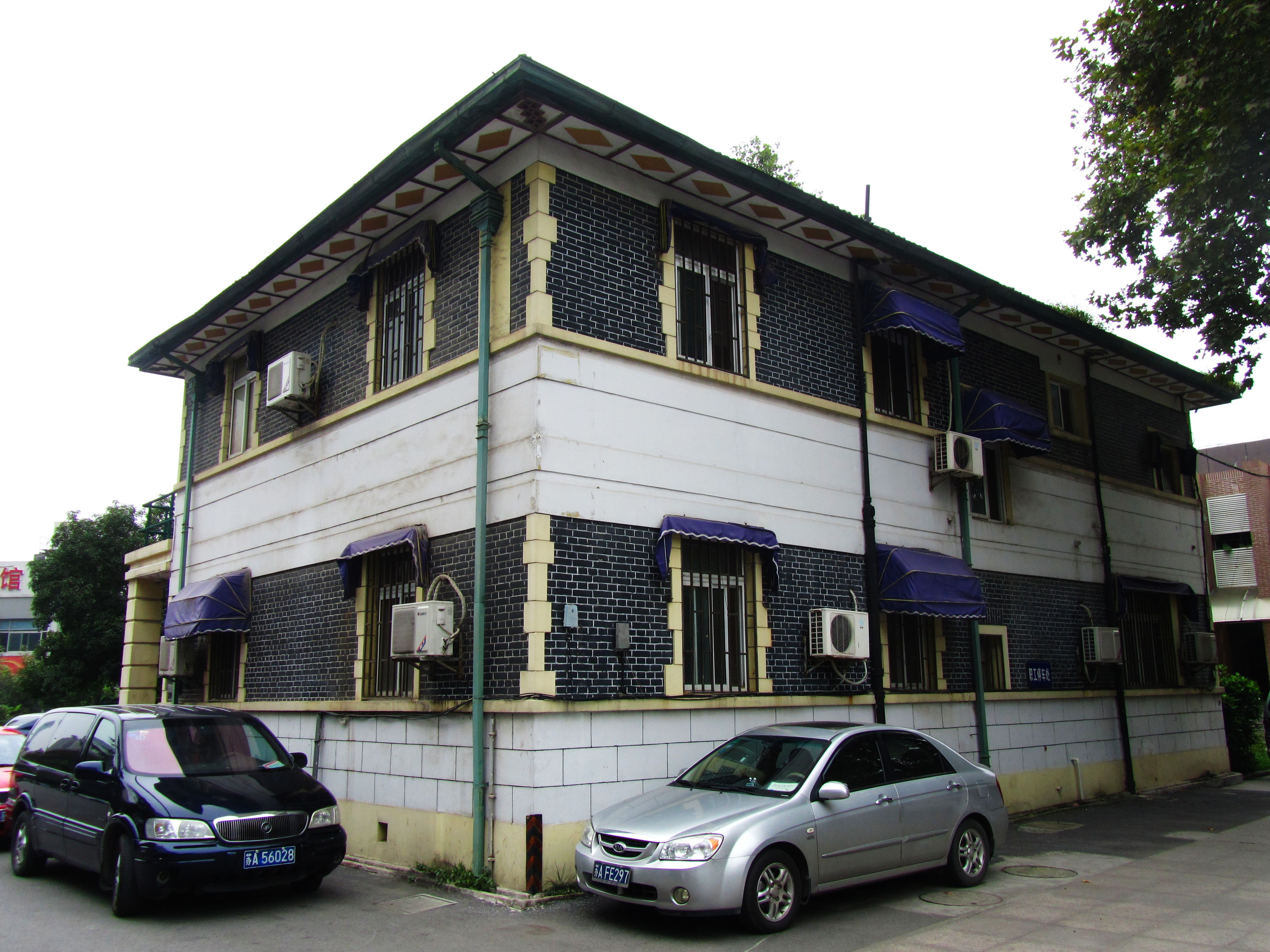 南京百步坡一号建筑，翁文灏公馆背面。